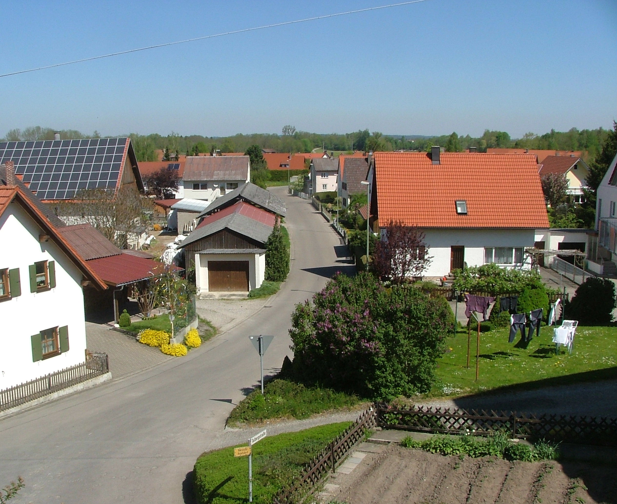 Heimertingen Wohngebiet Richtung Fellheim